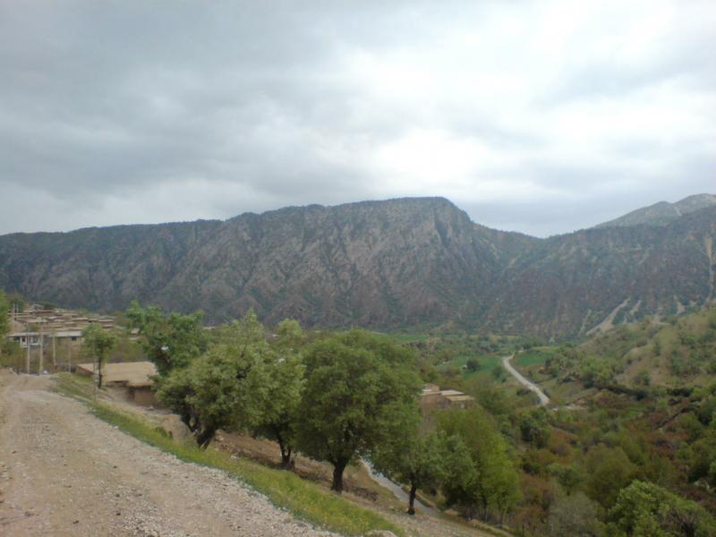 طبیعت روستای مهرنجان